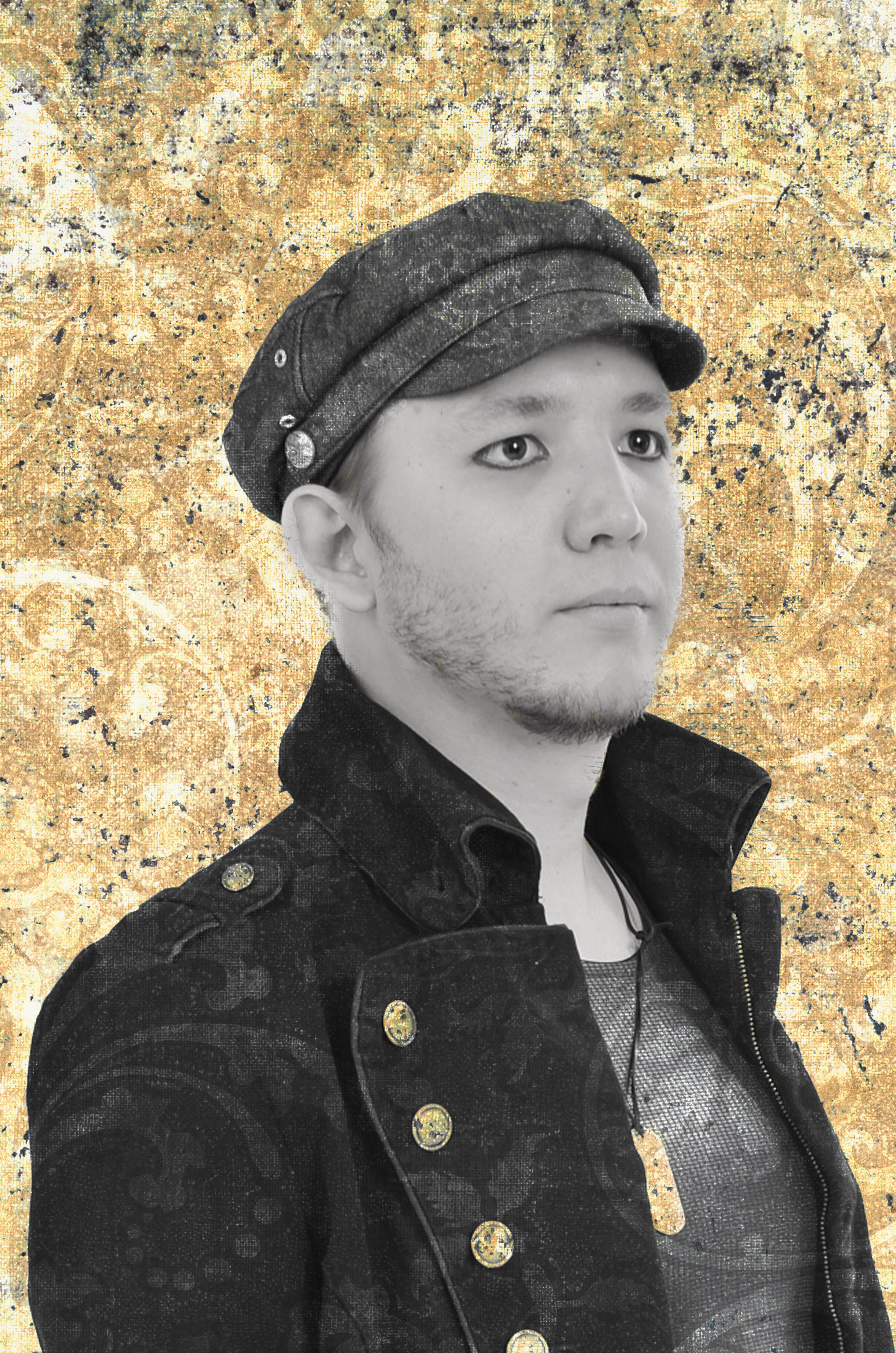 matt